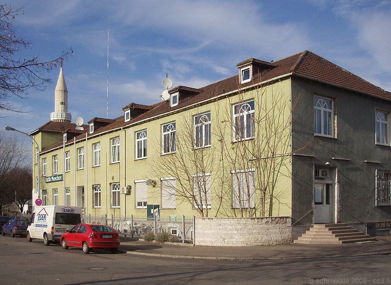 Fatih-Moschee in der Goppeltstraße 7 in Heilbronn